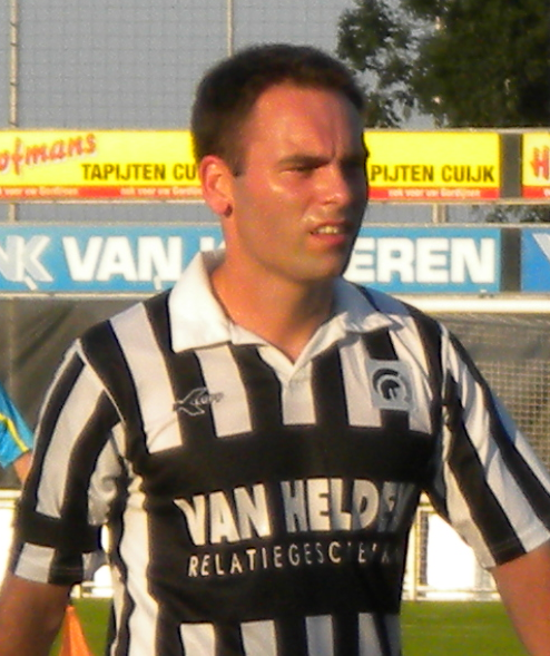 Achilles '29 player Thijs Hendriks walks off the pitch at half time during the friendly with Sporting Lisbon